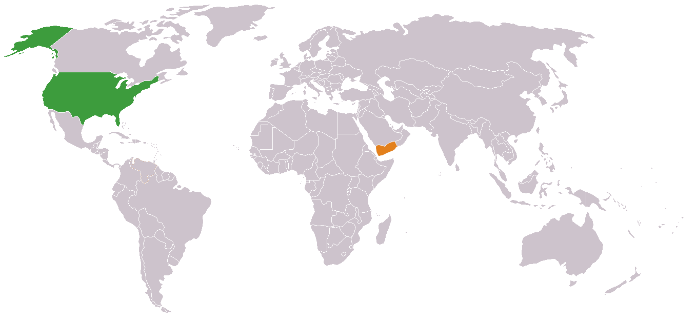 USA & Yemen locator map